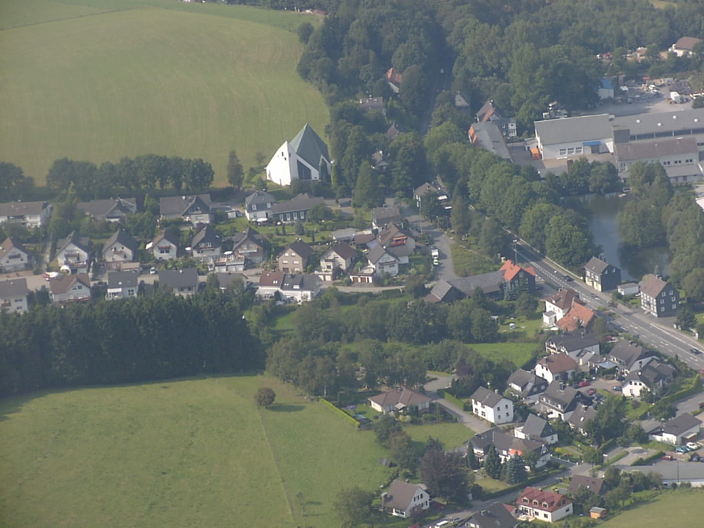 Luftbild von Hämmern